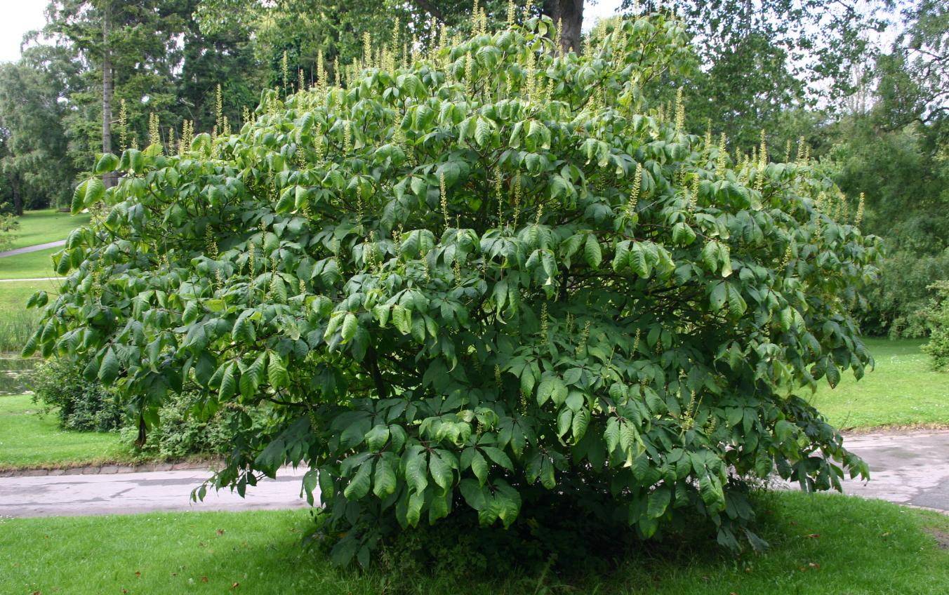 Aesculus parviflora: Habit.